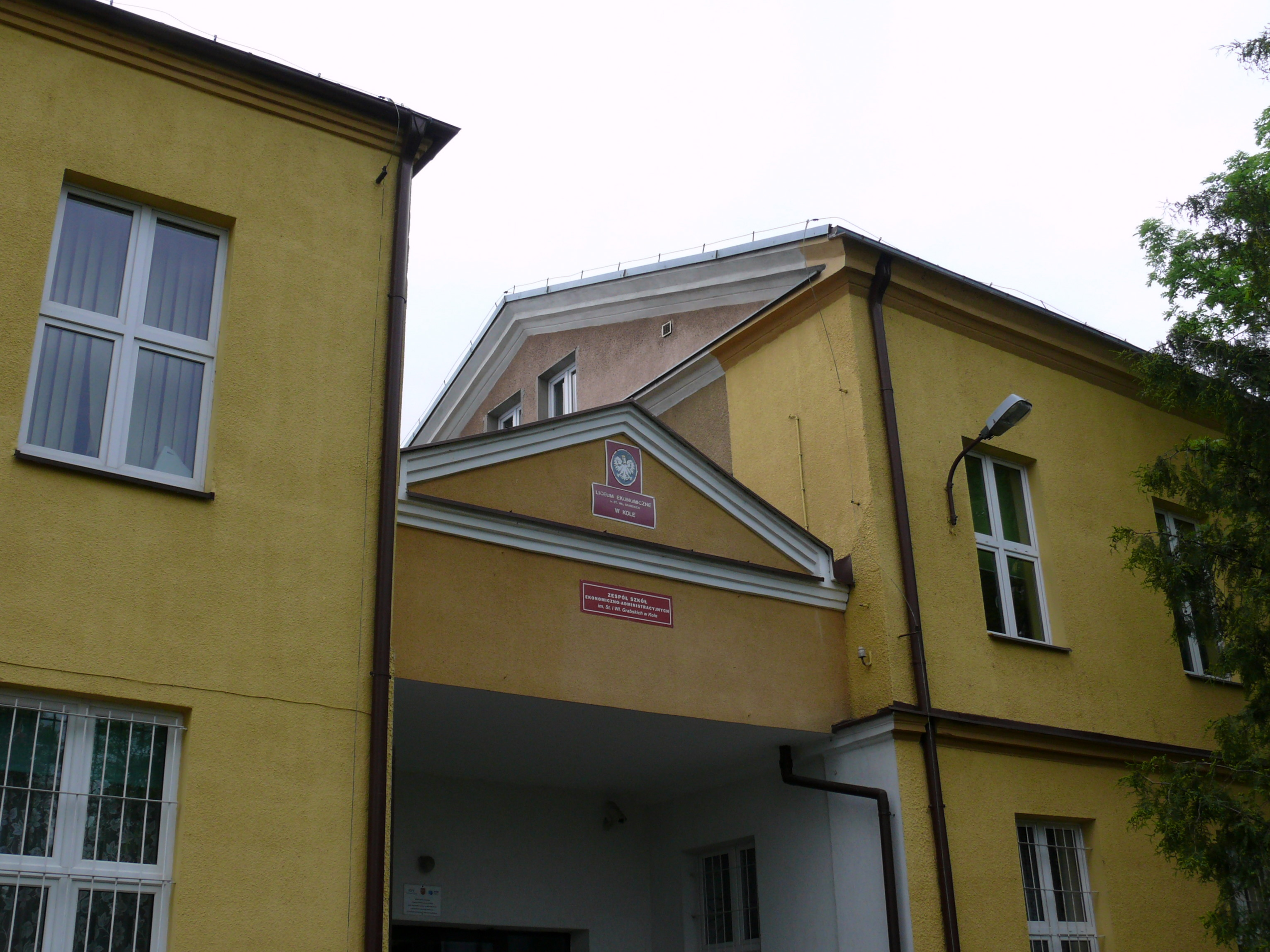 ZSEA w Kole